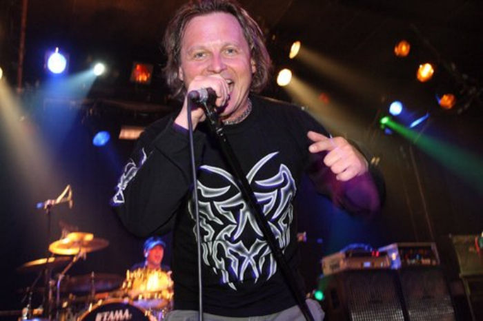 Matjaž Jelen